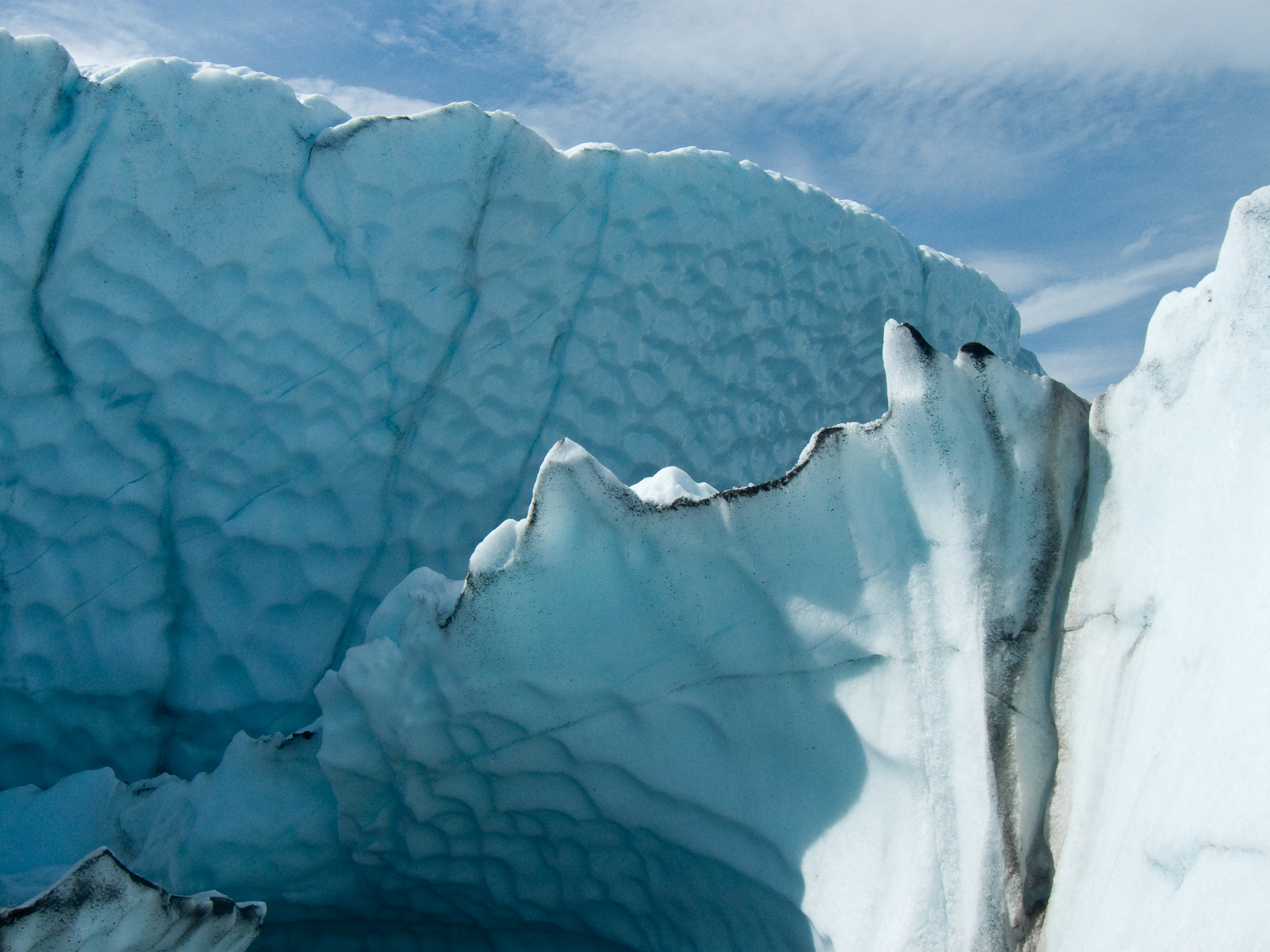 Matanuska Glacier, Alaska